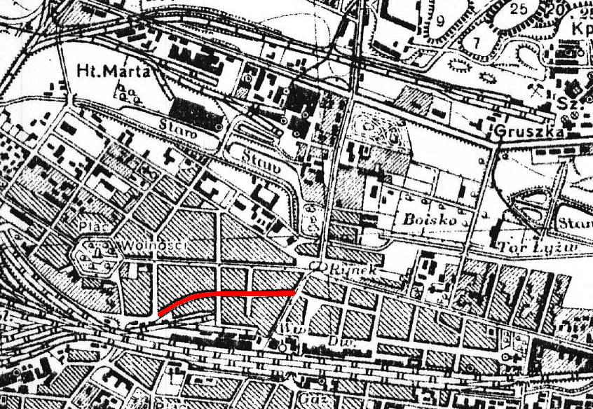 Mapa ulicy Młyńskiej w Katowicach na mapie Wojskowego Instytutu Geograficznego z 1933 roku.